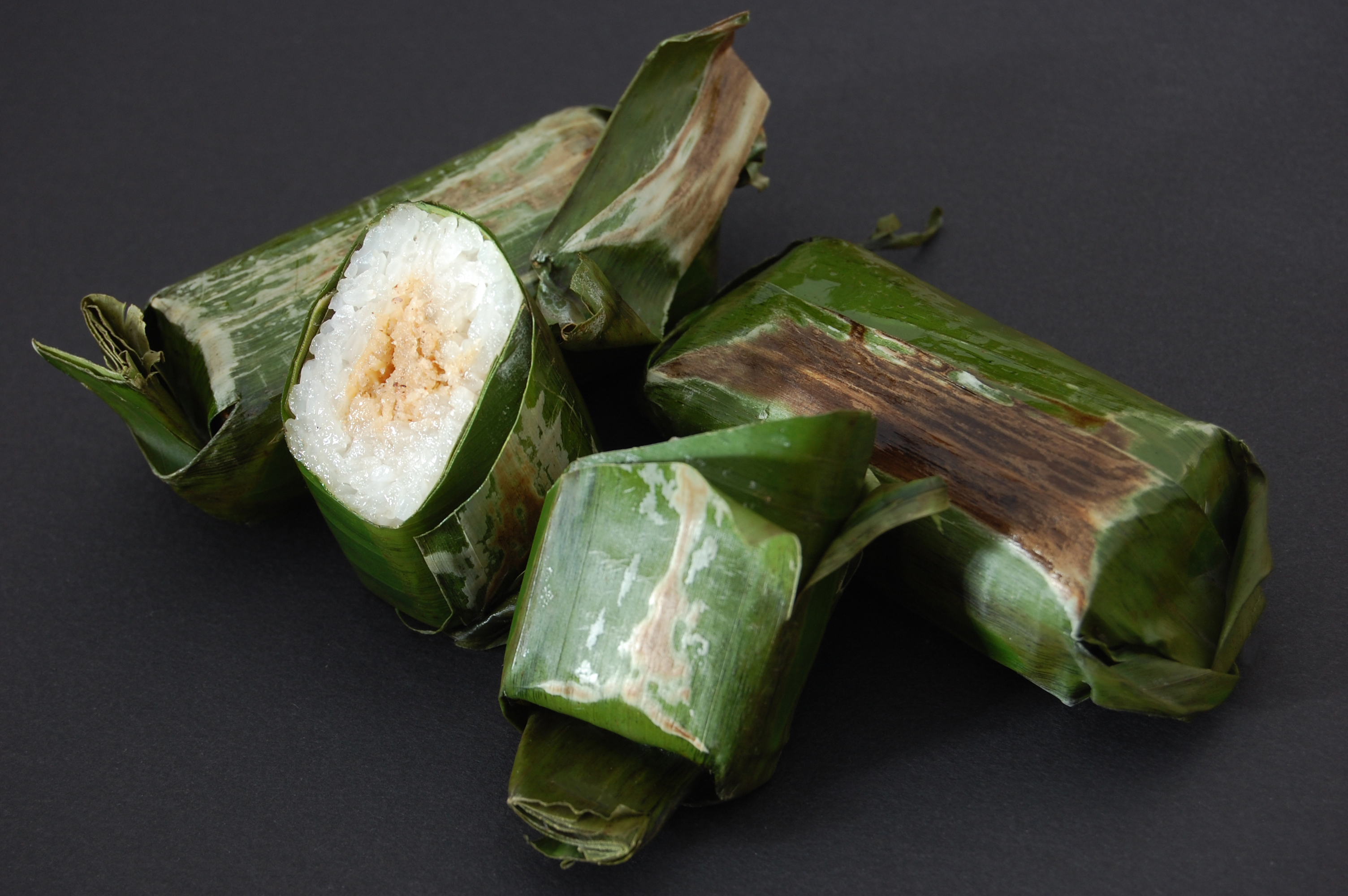 Lemper